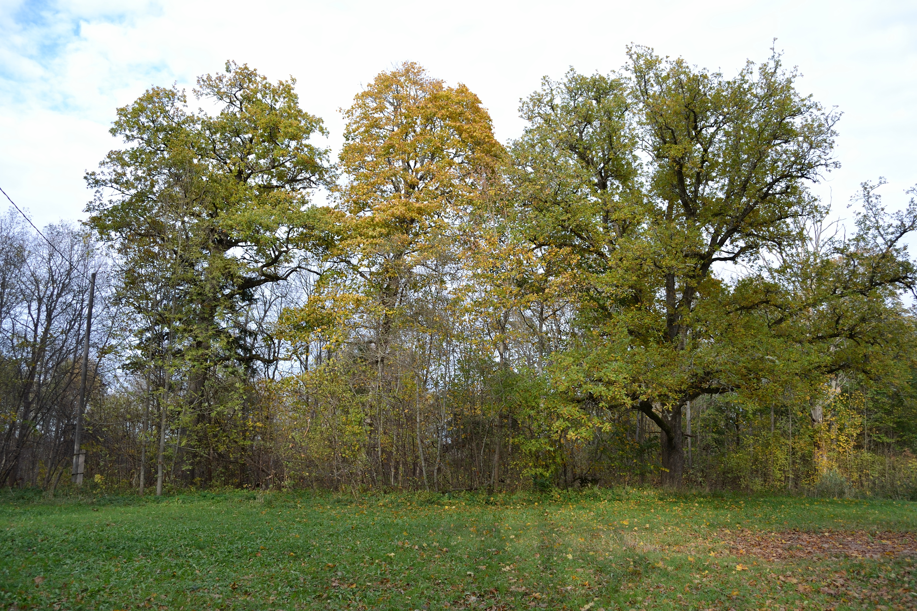 Ruila mõisa park